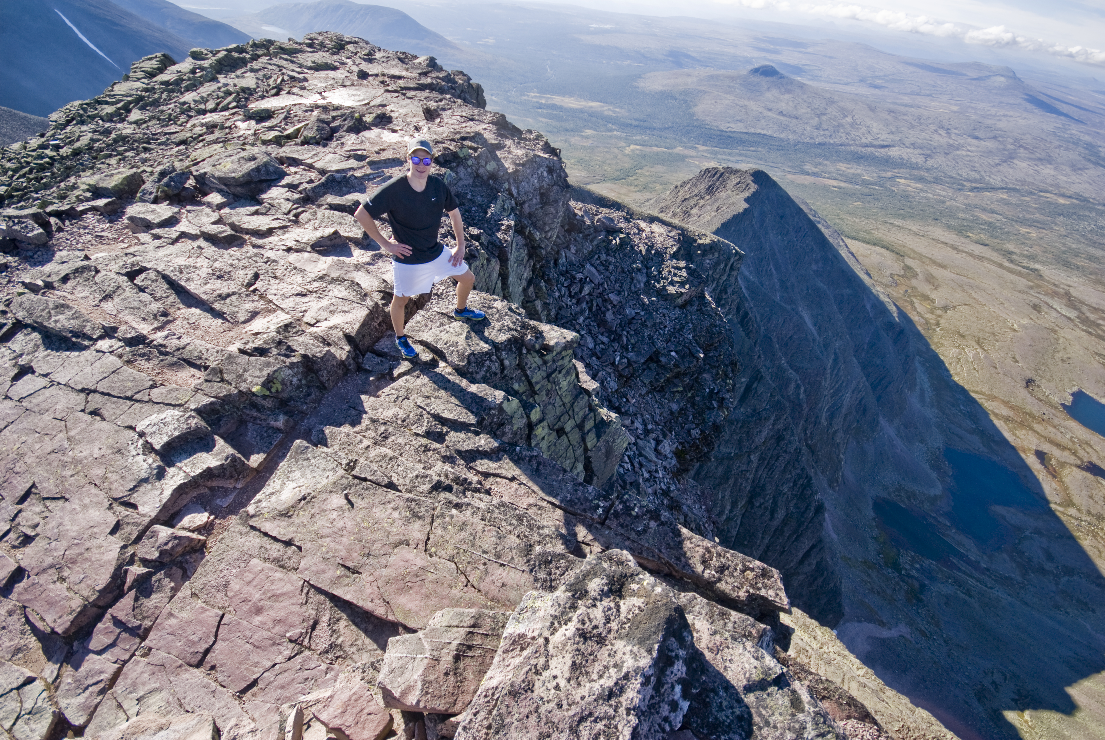 Det er bratt ned i juvet fra toppen